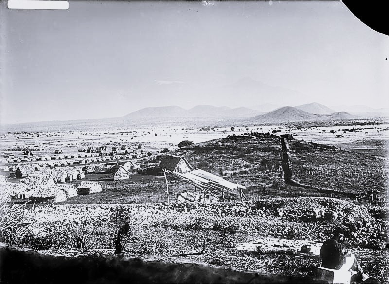 Taveta